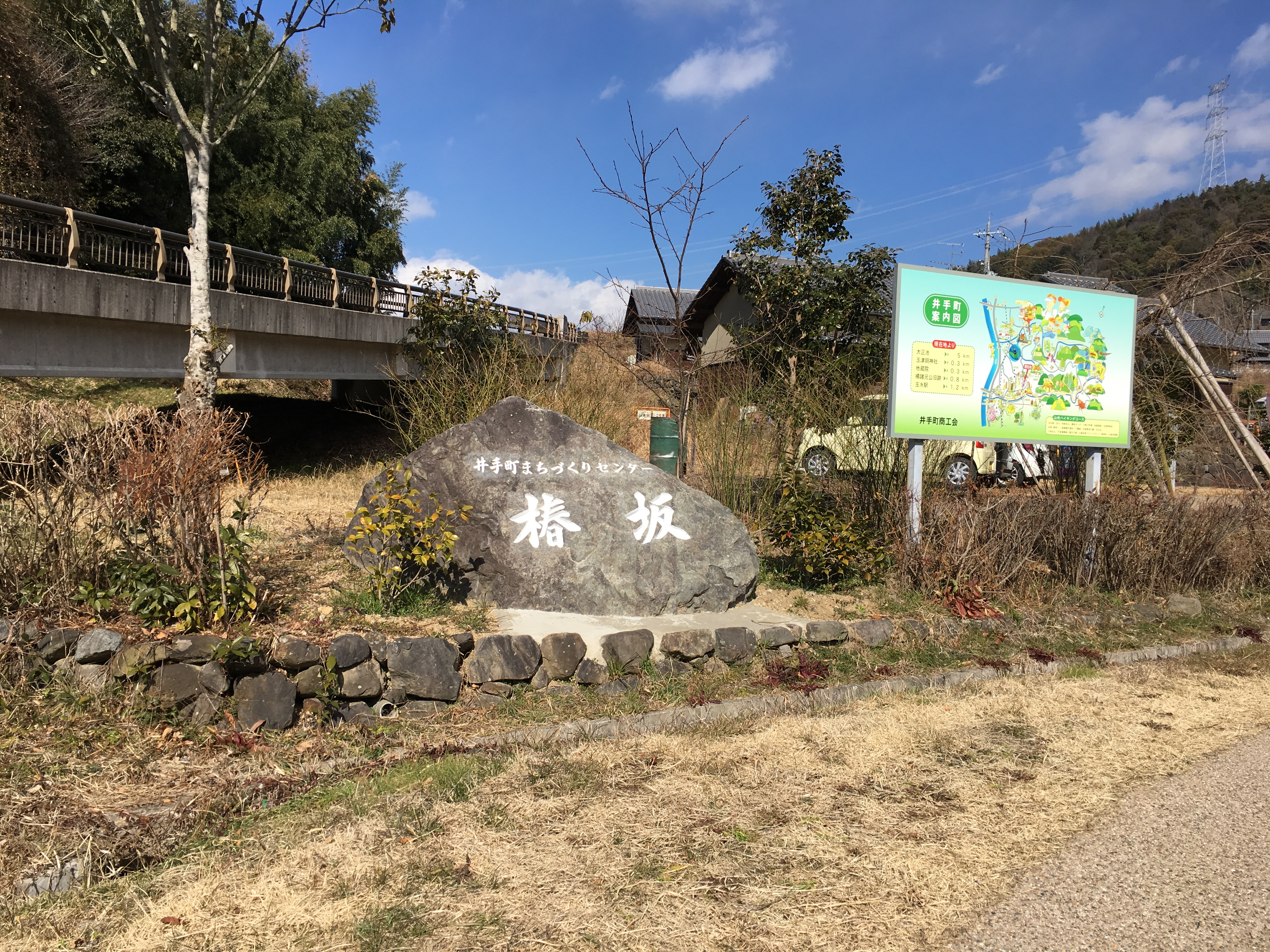 石橋瓦窯跡の上をまたぐように通る町道